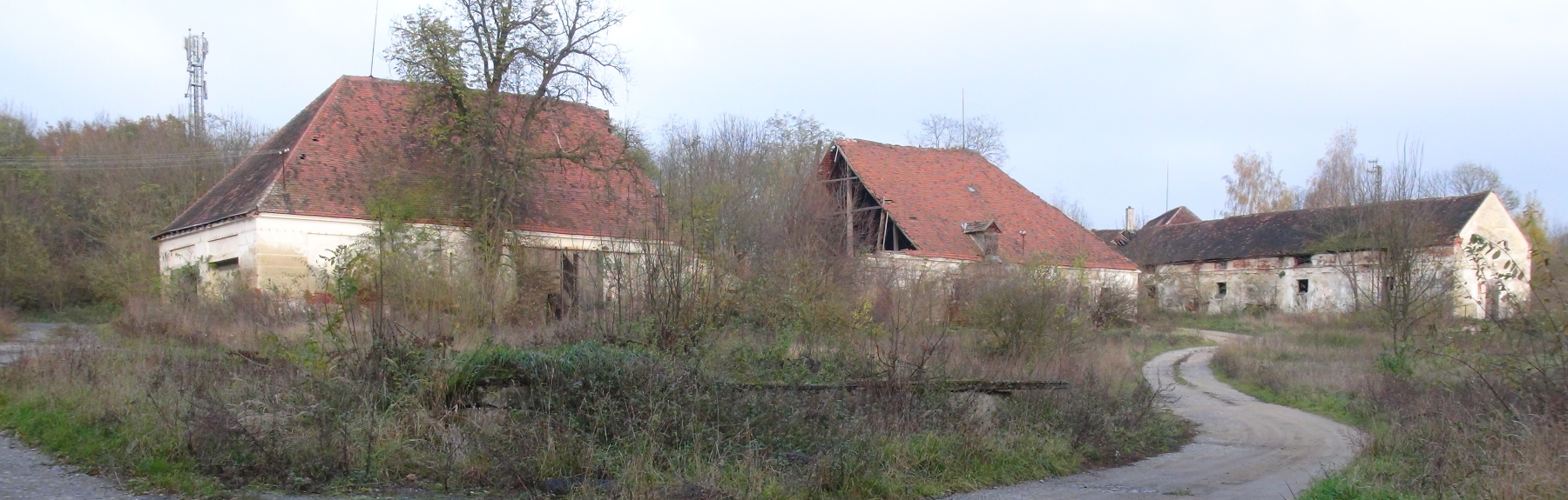 Der westlich von Schloss Vranov nad Dyjí - Frain an der Thaya gelegene ehemalige Meierhof